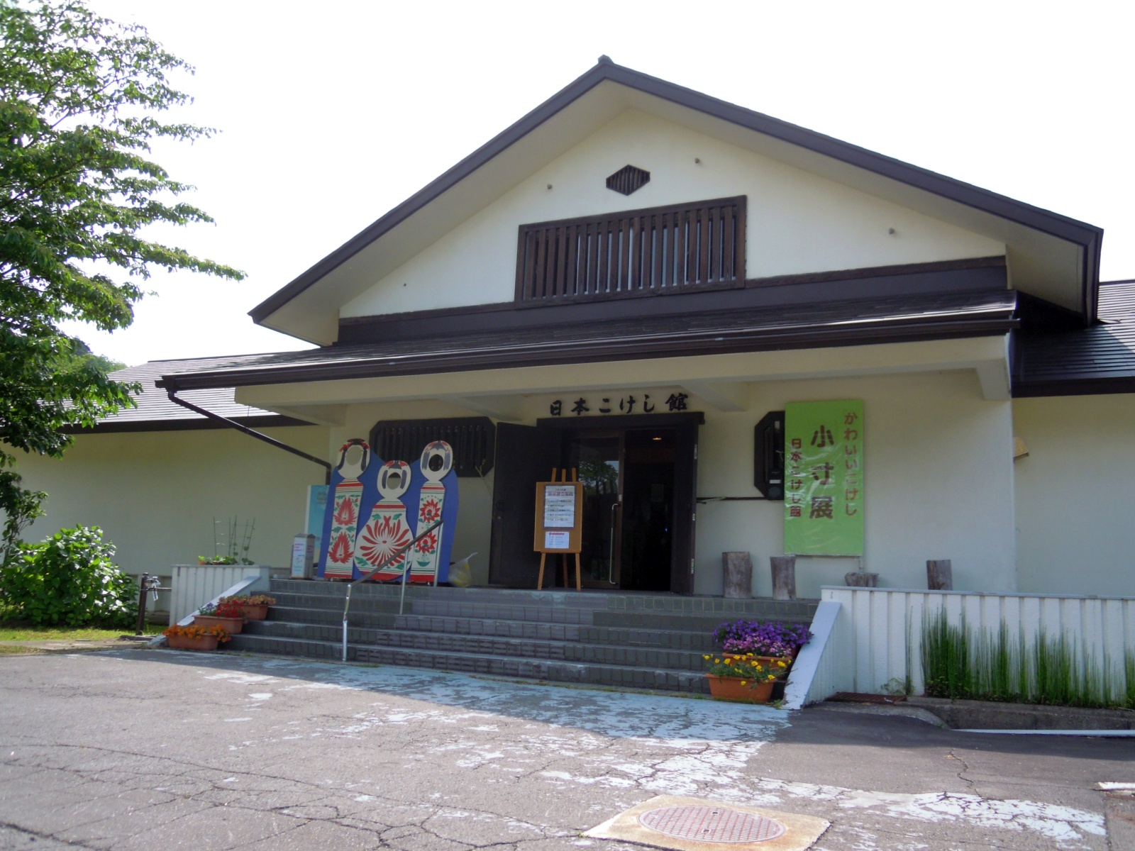 宮城県大崎市の鳴子公園内にある日本こけし館